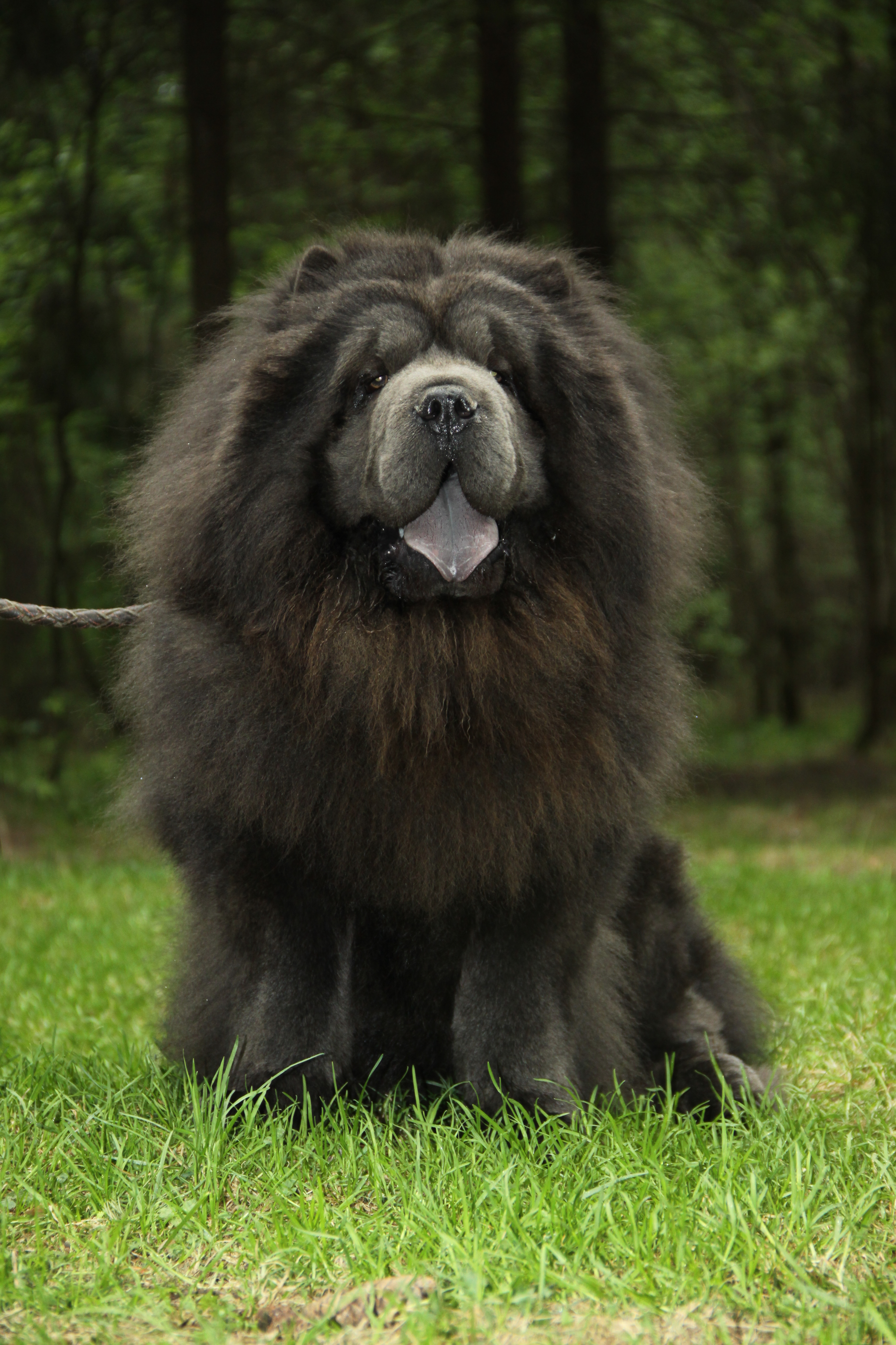 фото с выставки